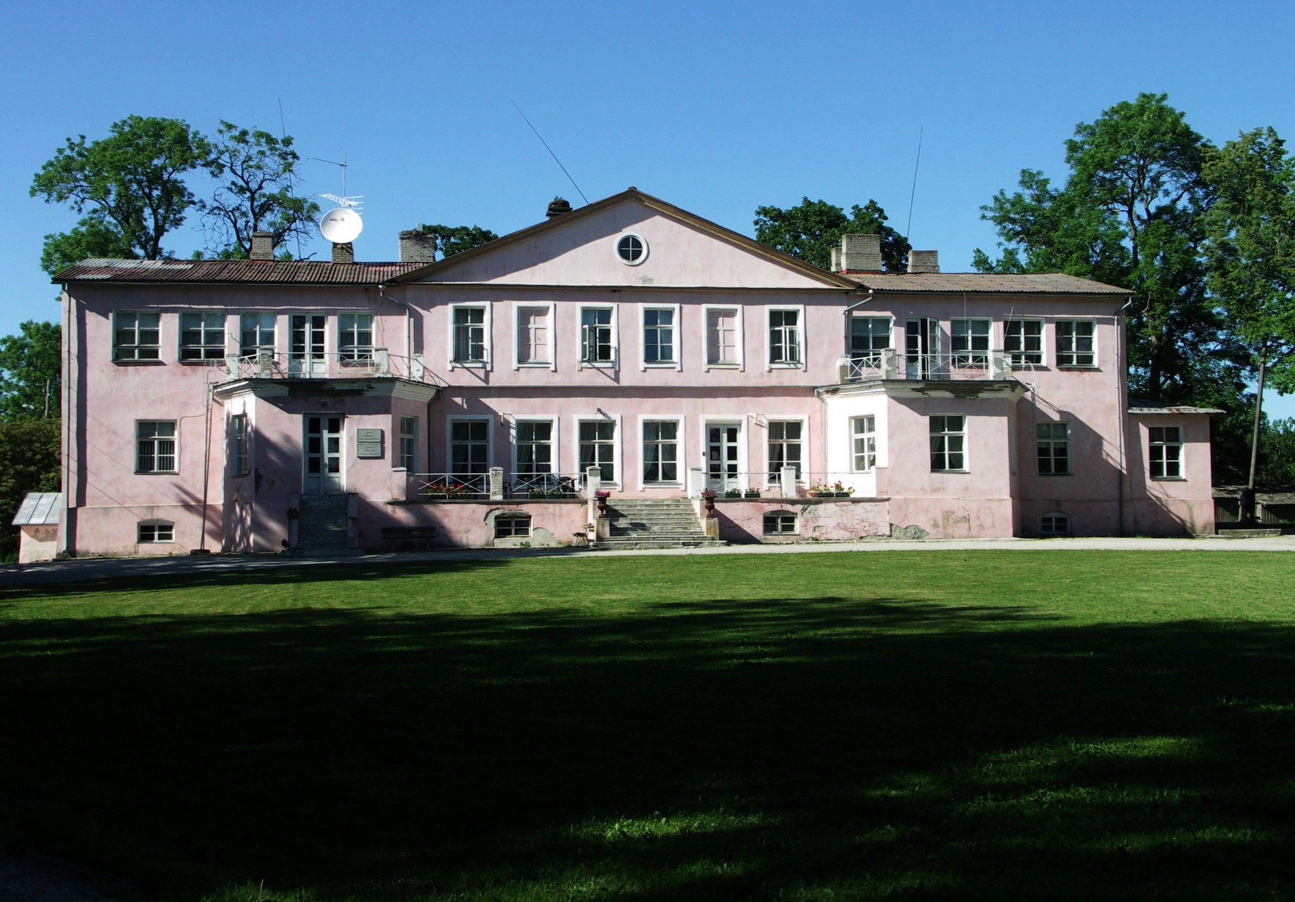 Rüütlimõis Lääne-Nigula kihelkonnas Läänemaal. Vidruka küla